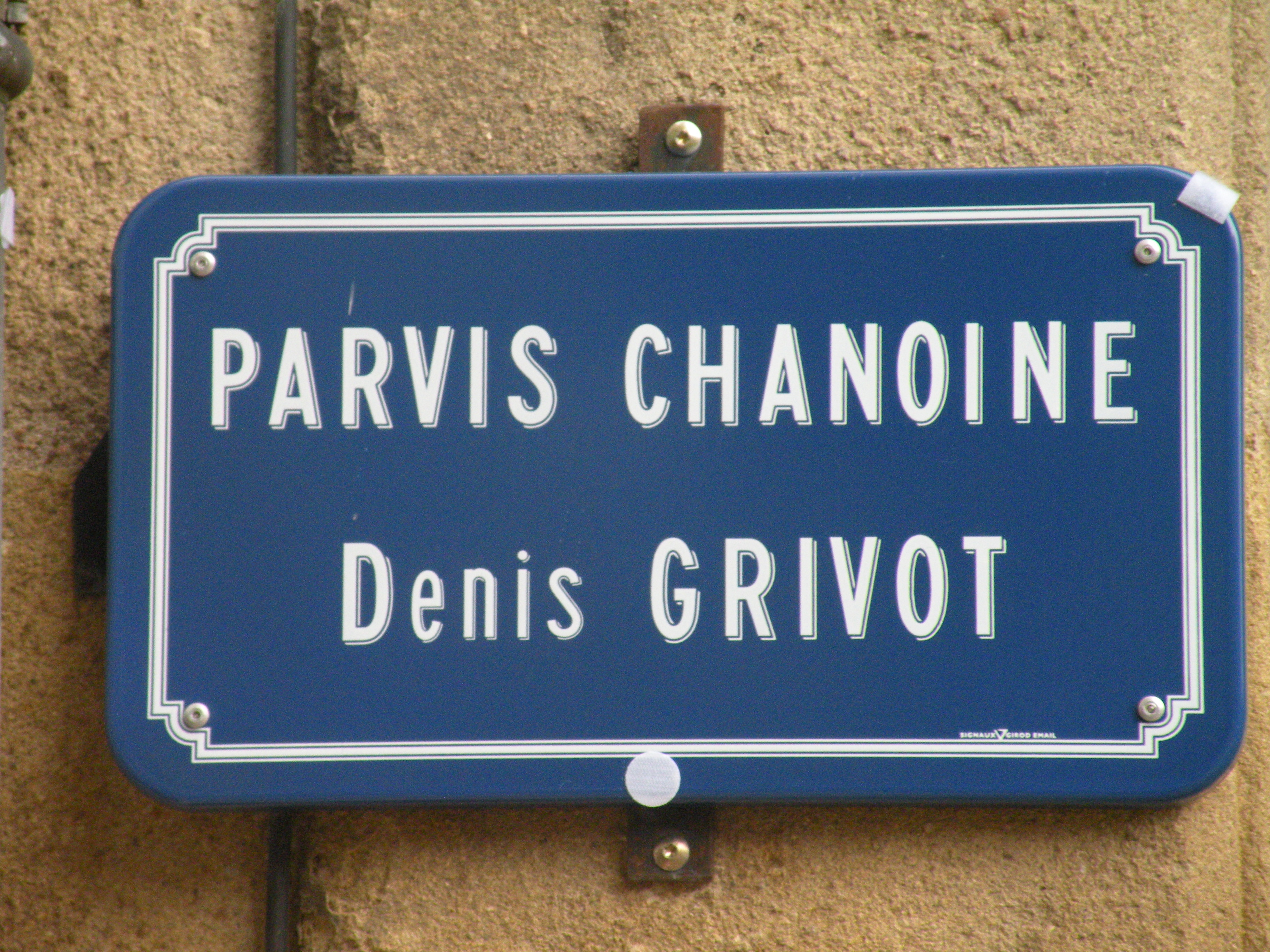 Inauguration par Remy Rebeyrotte, du parvis Chanoine Denis Grivot sur le parvis de la cathédrale d'Autun.